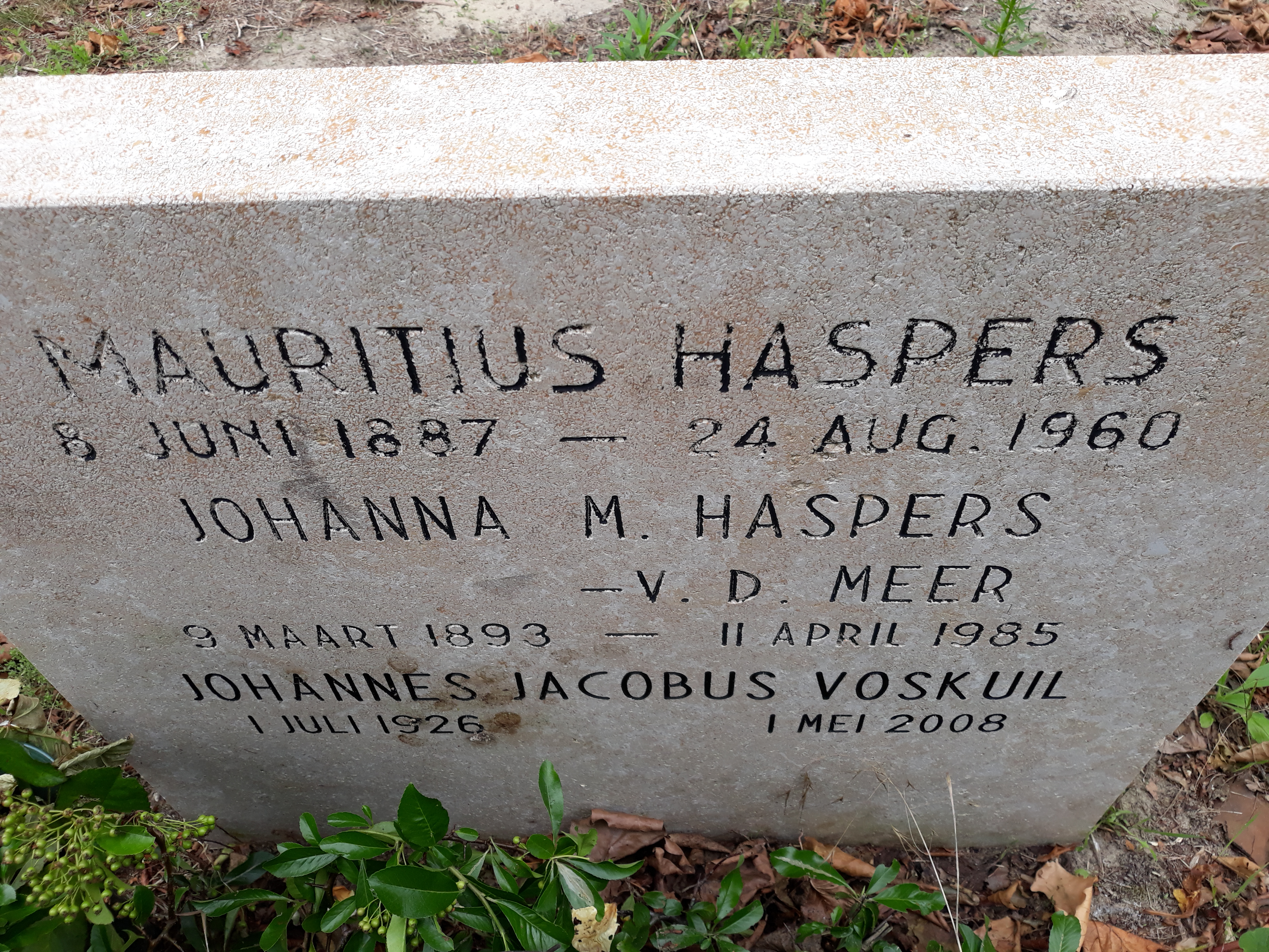 Das Grab des niederländischen Schriftstellers ("Het Bureau") und Volkskundlers Johannes Jacob Voskuil auf dem Friedhof Oude Eik en Duin in Den Haag.